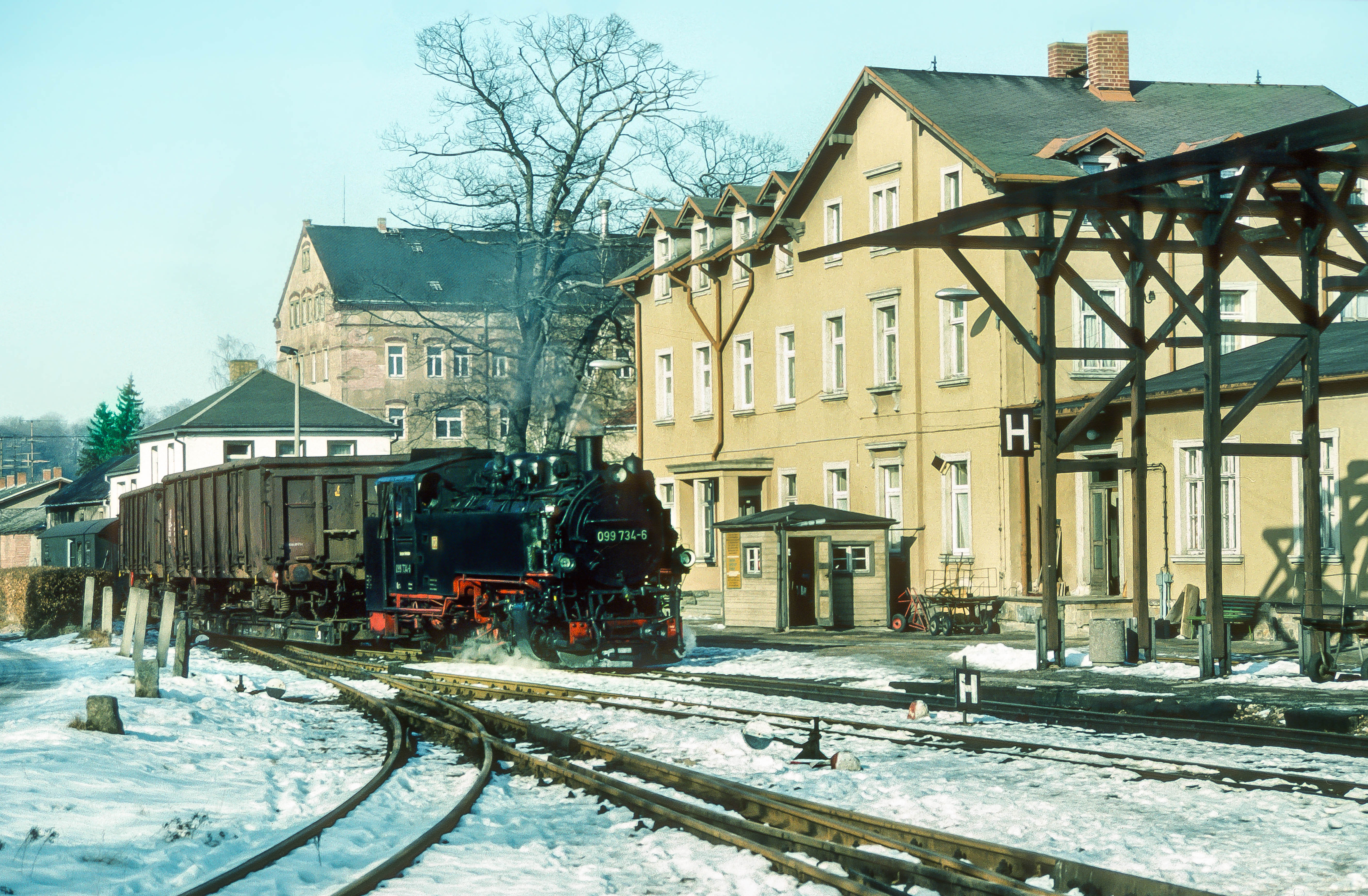 Einfahrt Dippoldiswalde mit 099 734 (Reichsbahn-EDV-Nr.: 99 1761)